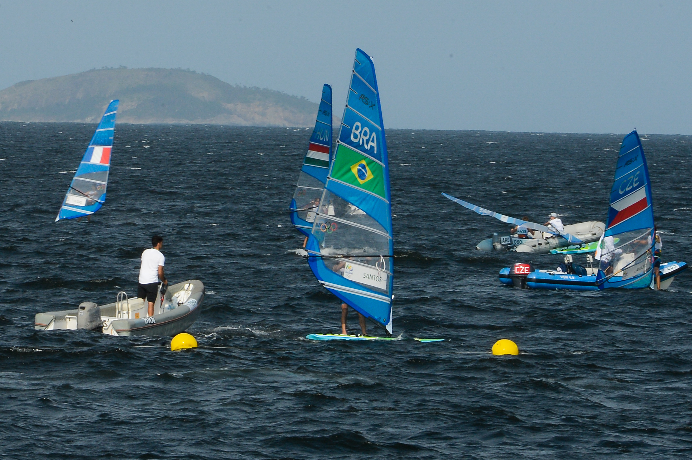 Rio de Janeiro - Público sem ingresso para os Jogos Rio 2016 assiste à competição de vela na Praia do Flamengo (Tomaz Silva/Agência Brasil)